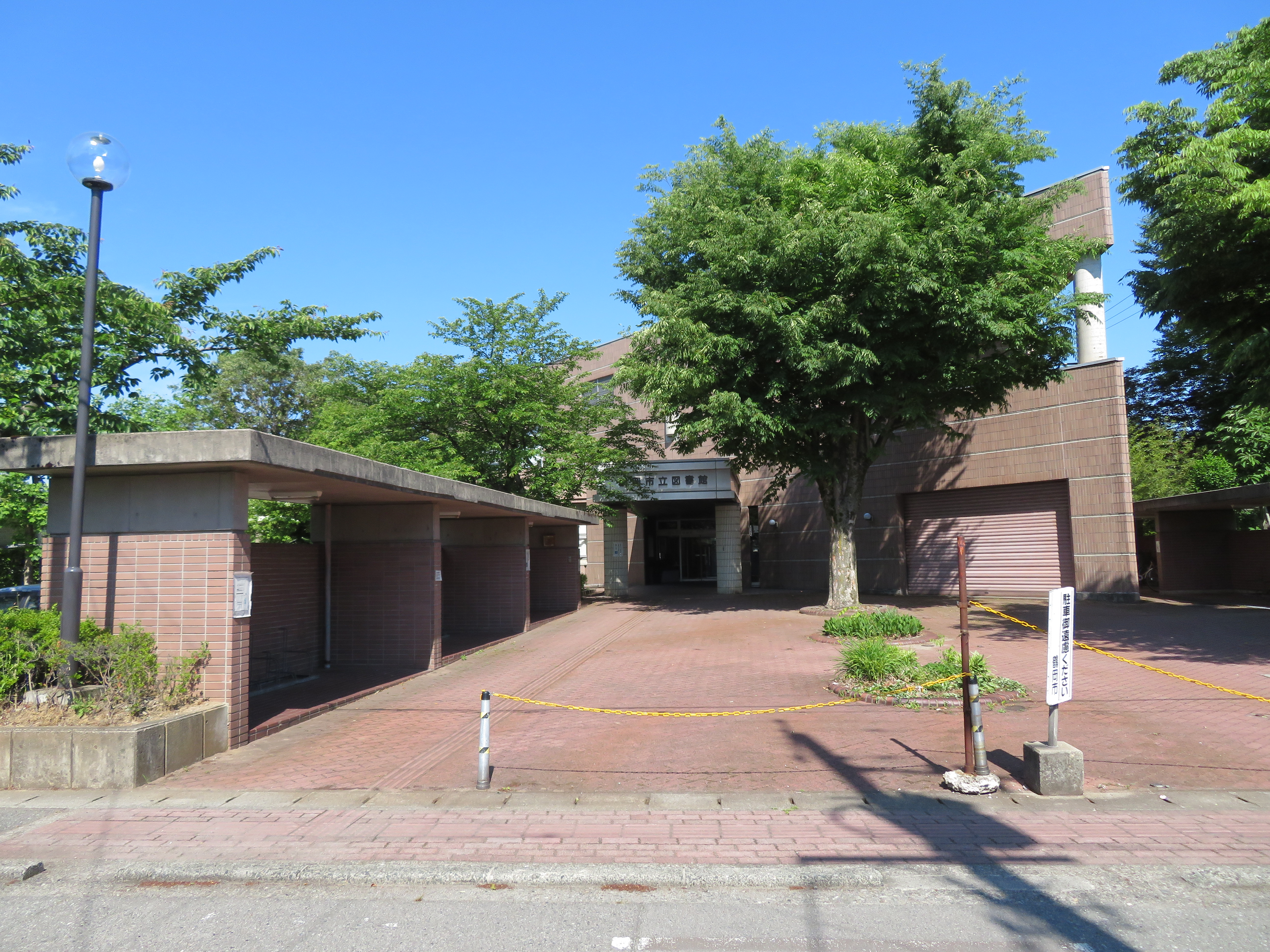 山形県に所在する鶴岡市立図書館建物